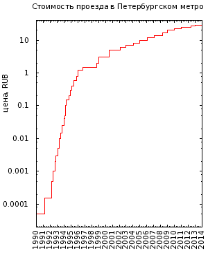 Логарифмический график стоимости проезда в петербургском метро